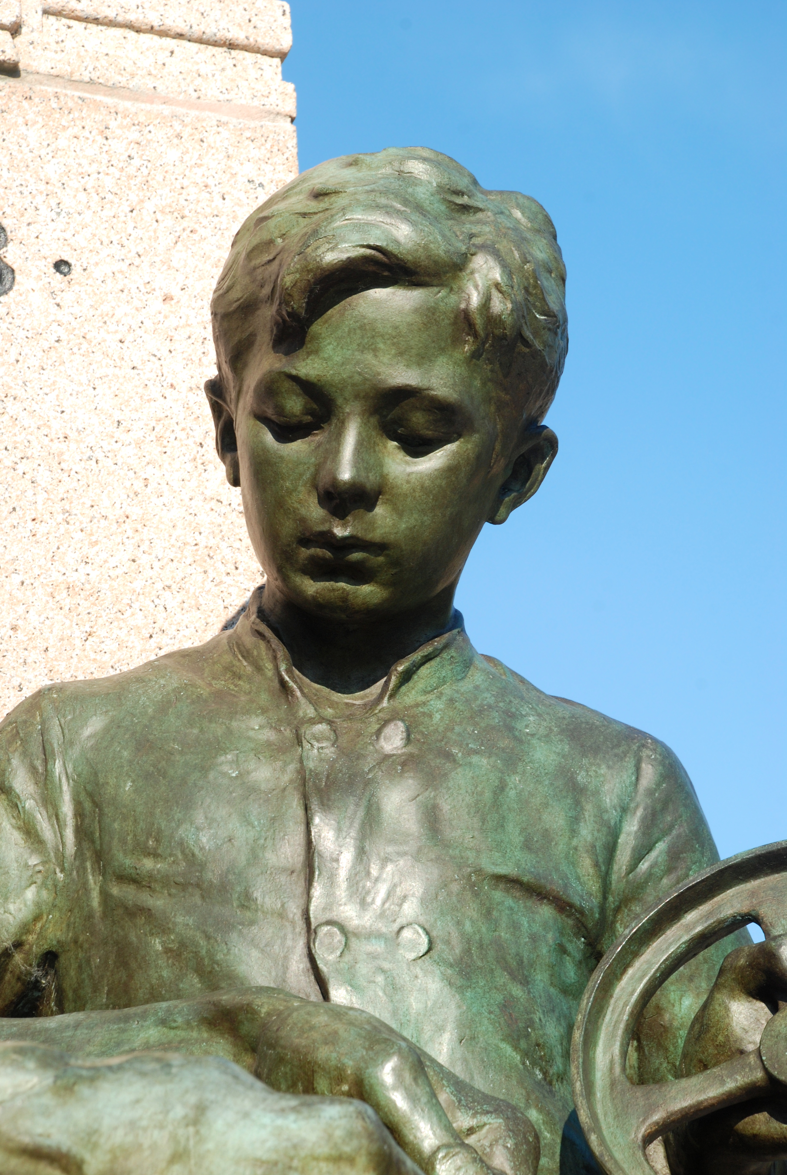 Belgique - Brabant wallon - Court-Saint-Étienne - Monument à Émile Henricot